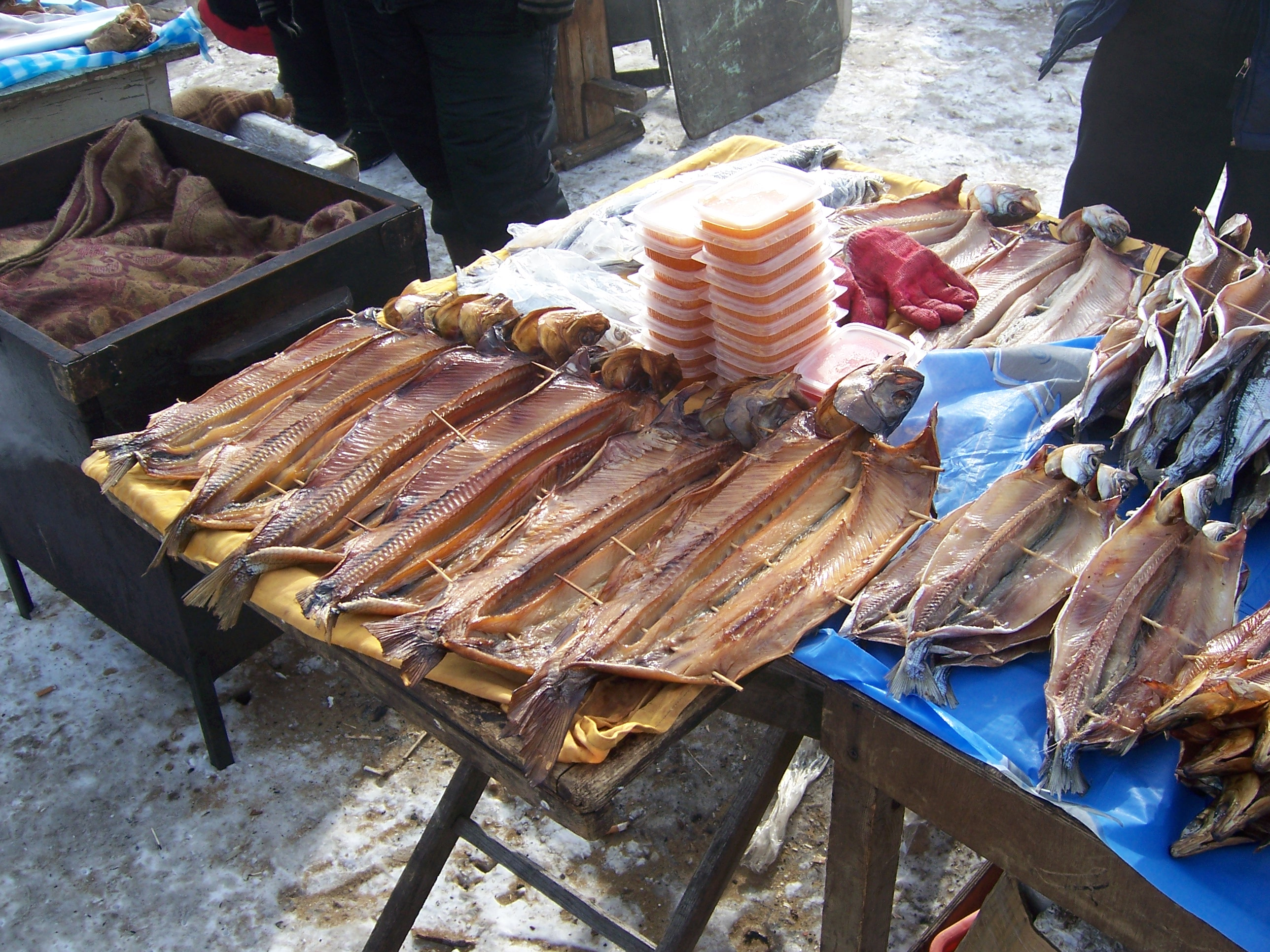 Omul on market in Listvyanka, Baikal